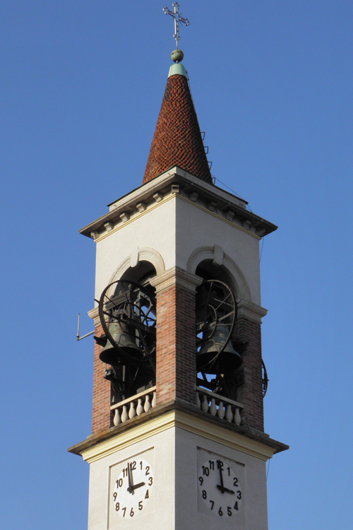 Il campanile di Robbiano, nel comune di Giussano (MB)